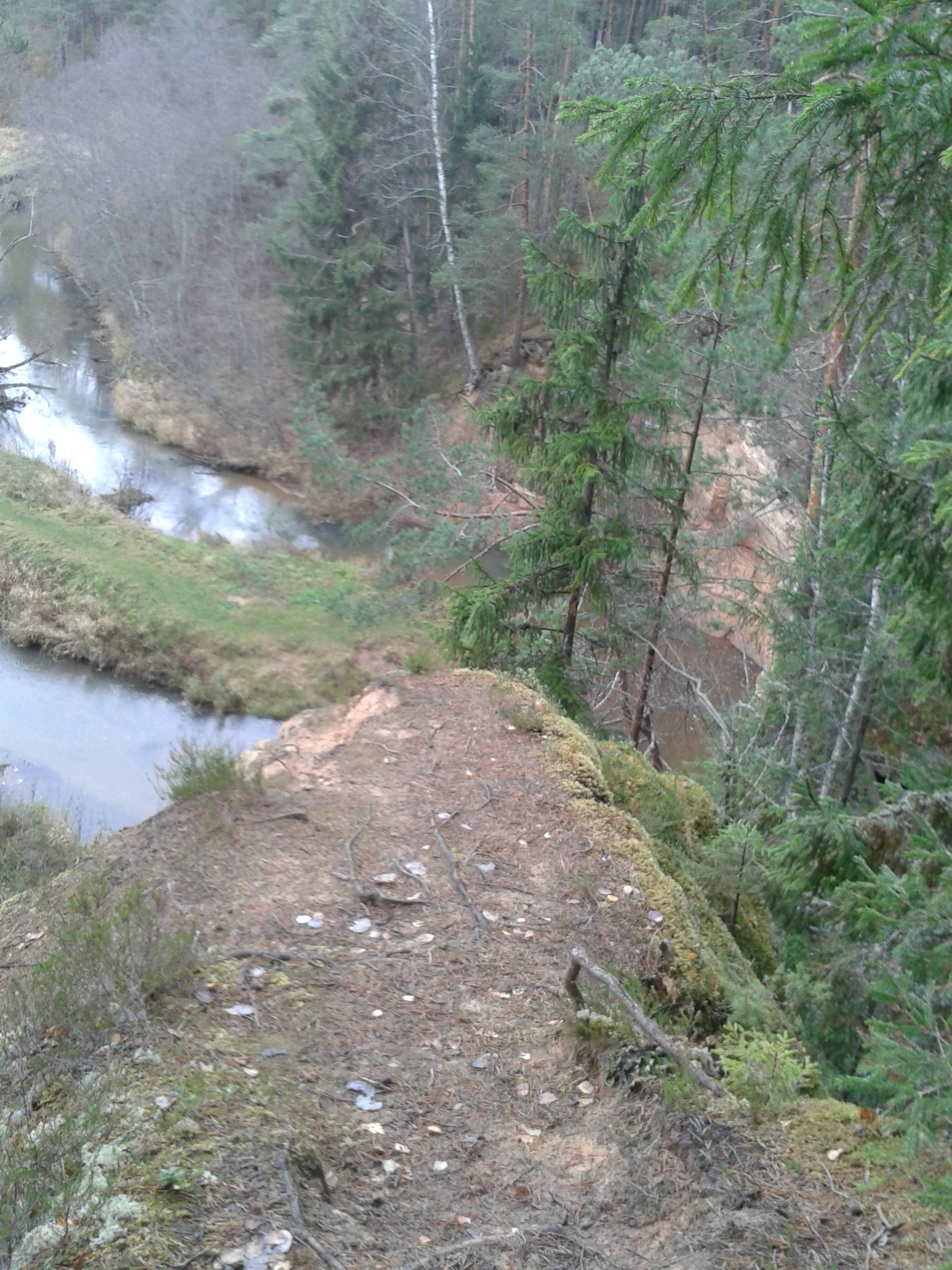 Piusa jõe ürgorg